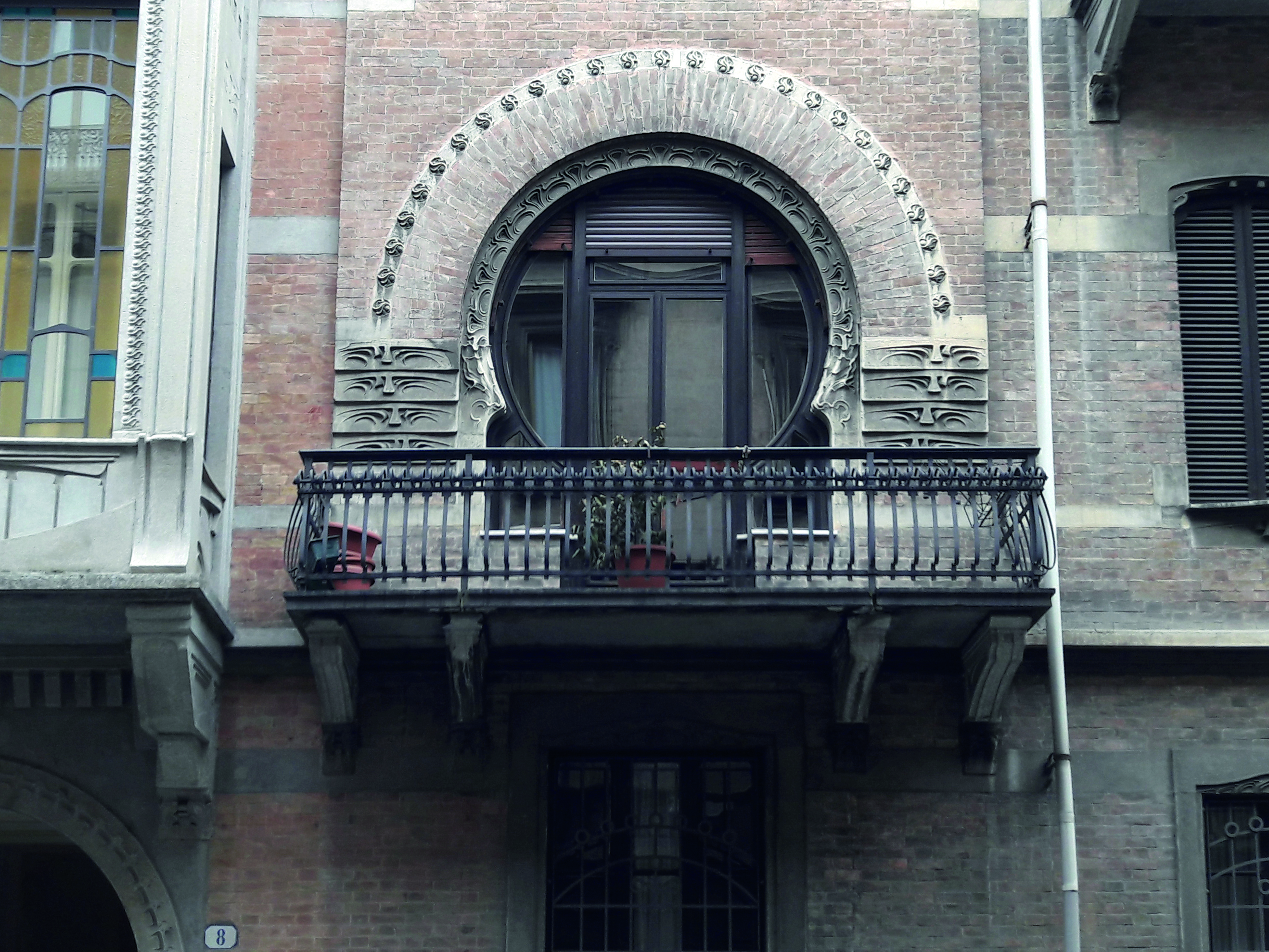 Dettaglio architettonico sezessionstil di Casa Bonelli